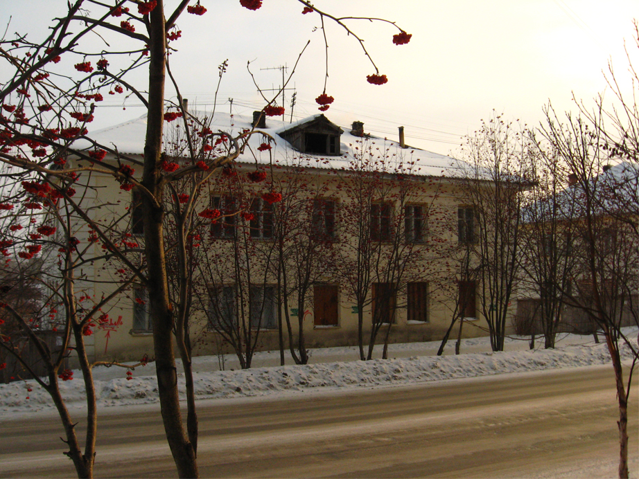 дом на ул.Советской, г.Красноуфимск